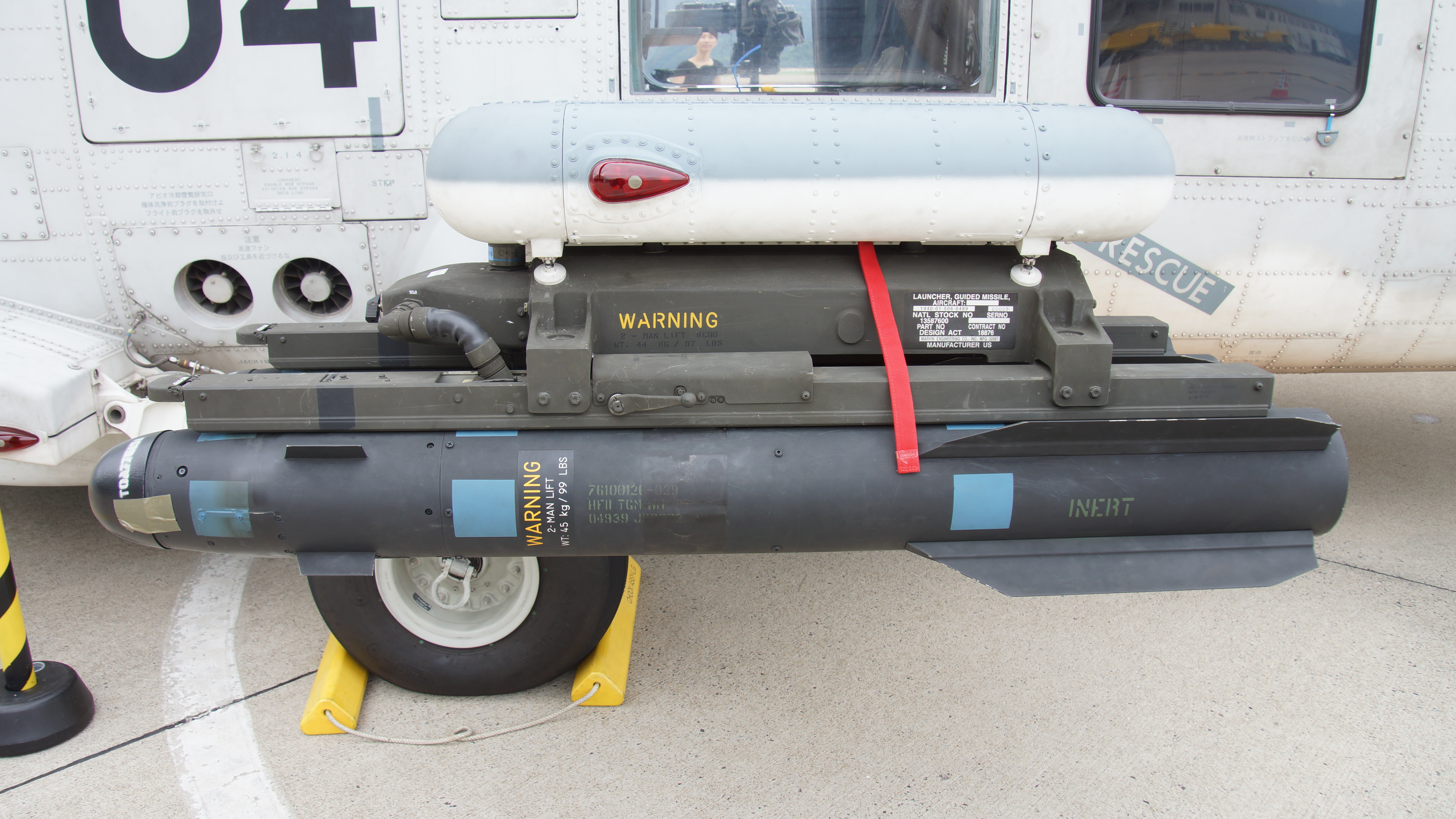 海上自衛隊 SH-60K哨戒ヘリコプター（8404号機） 左パイロンに吊下されたAGM-114MヘルファイアⅡ空対艦ミサイル（訓練弾） 左側面。2017年7月29日 舞鶴航空基地にて。